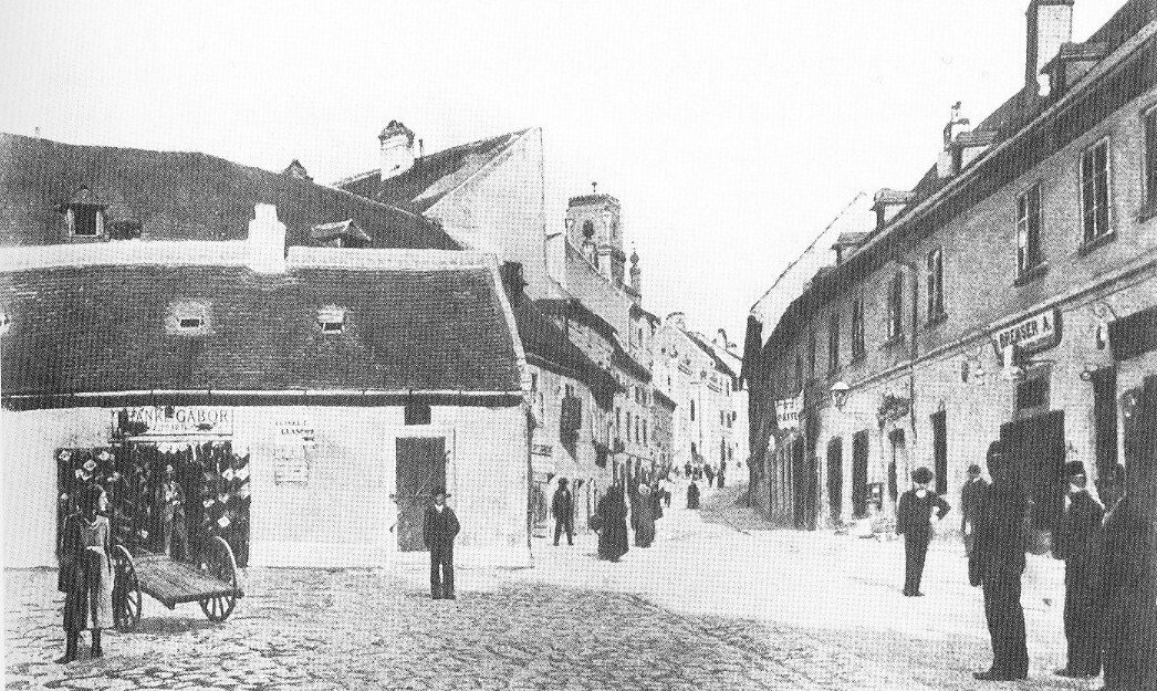 Bratislava